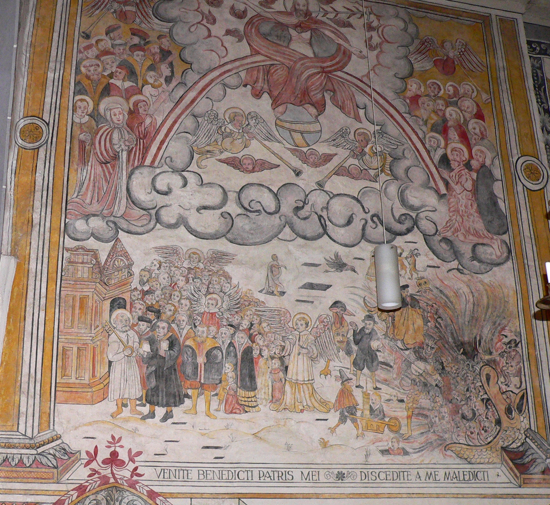 Evangelische Kirche St. Laurentius in Dassel, Niedersachsen, Deutschland - Protestantische Renaissancemalerei (Secco): "The Last Judgment" von 1577